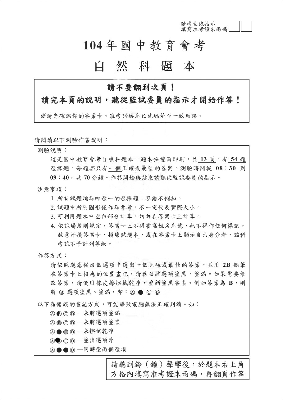 中華民國104年國中教育會考自然科題本封面，中央印粉紅色「新聞用試題本」六字浮水印。